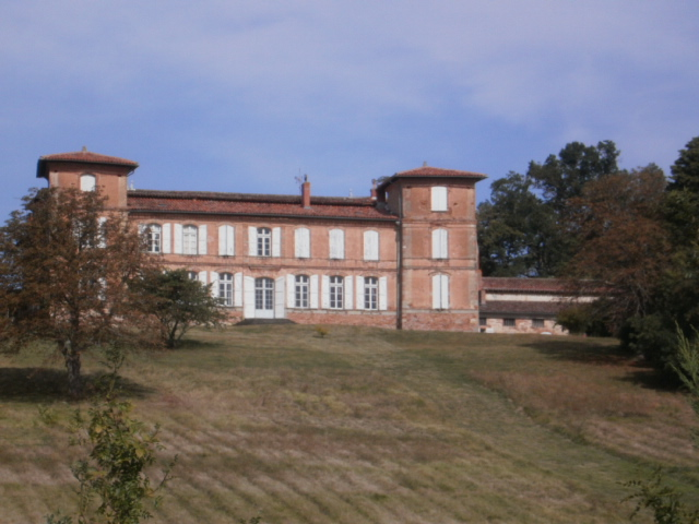 Château de Mourvilles-Basses .